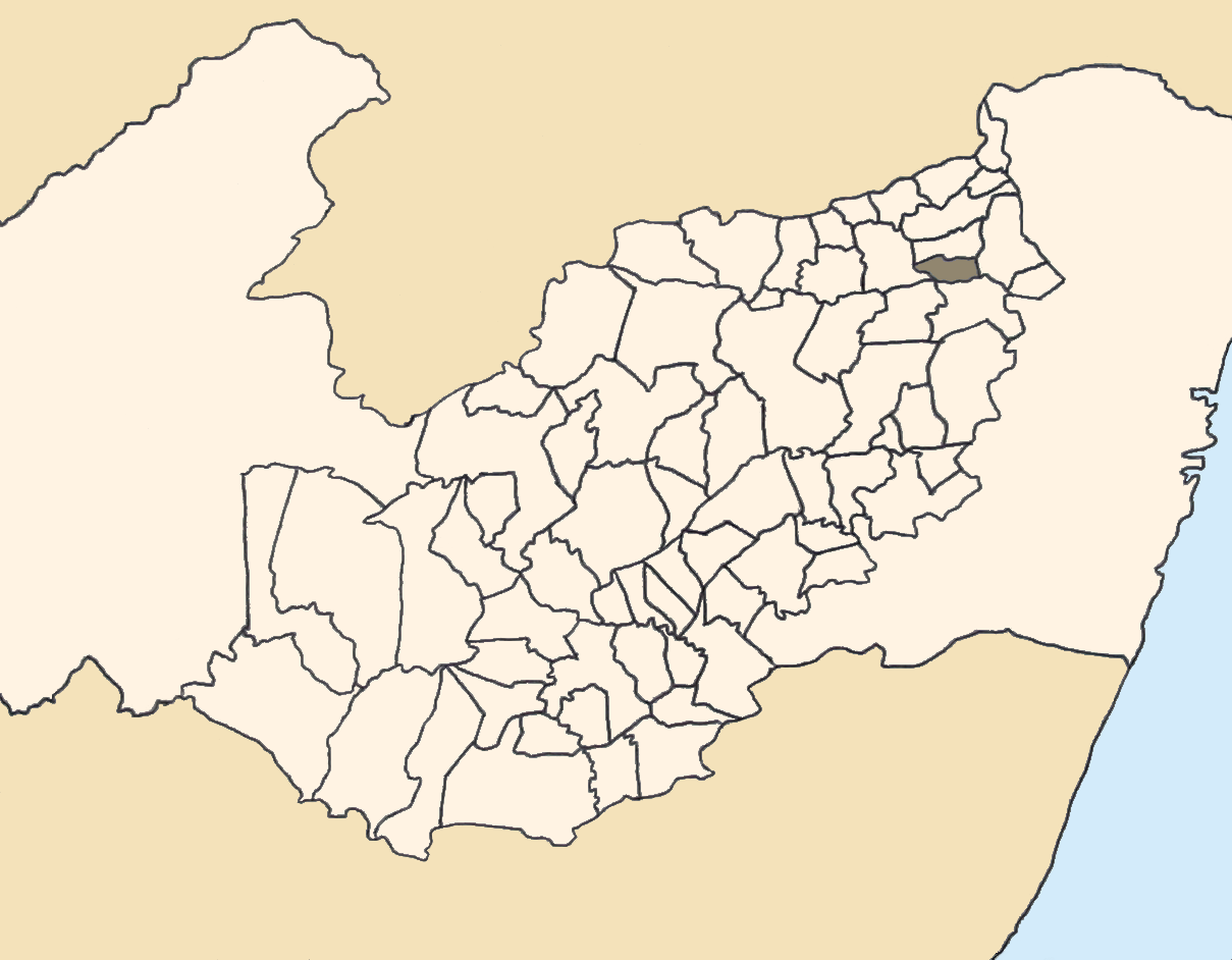 Mapa da mesorregião Agreste de Pernambuco (Brasil) subdivida em municípios. Em destaque, o município de Salgadinho. Map of the brazilian state of Pernambuco (mesorregião Agreste) showing the city of Salgadinho. Imagem tratada com o GIMP. Image made with GIMP.